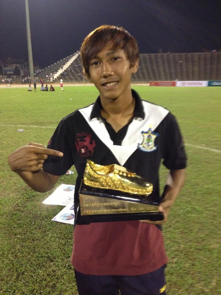 Chan vathanaka